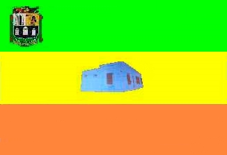 Bandera de San Carlos